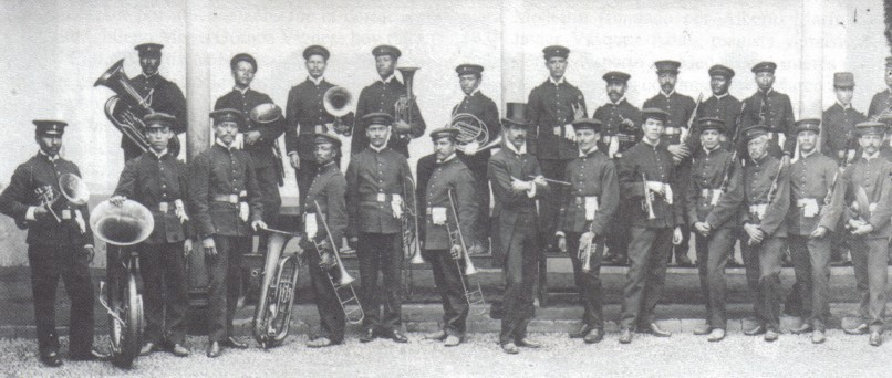 Rafael D’Aleman y Banda de Música, fotografía tomada en 1908 por Benjamín de la Calle.